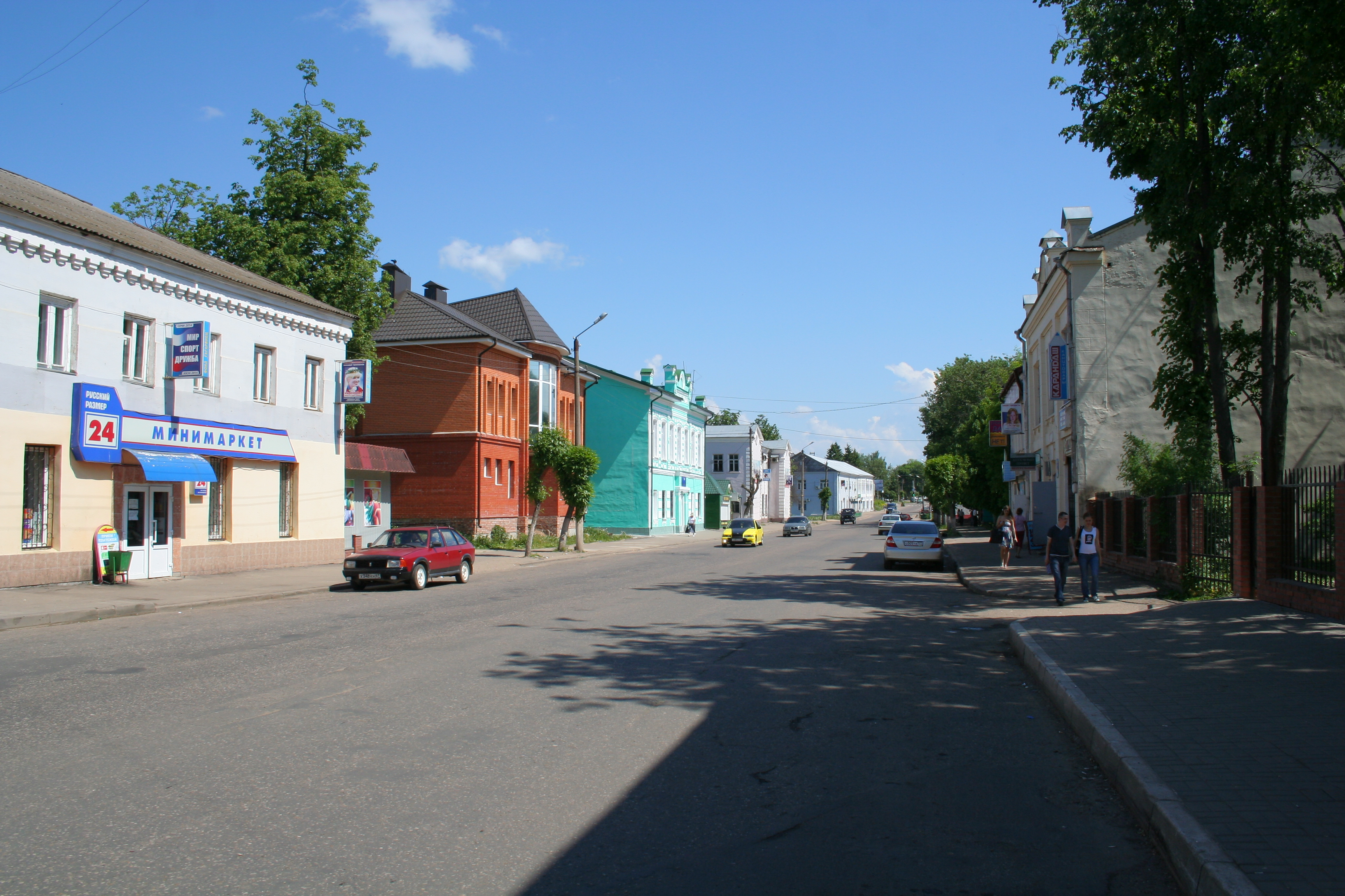 Stadt Gagarin (ehem. Gschatsk), Oblast Smolensk, Russland. Lenin-Straße, Gesamtansicht.